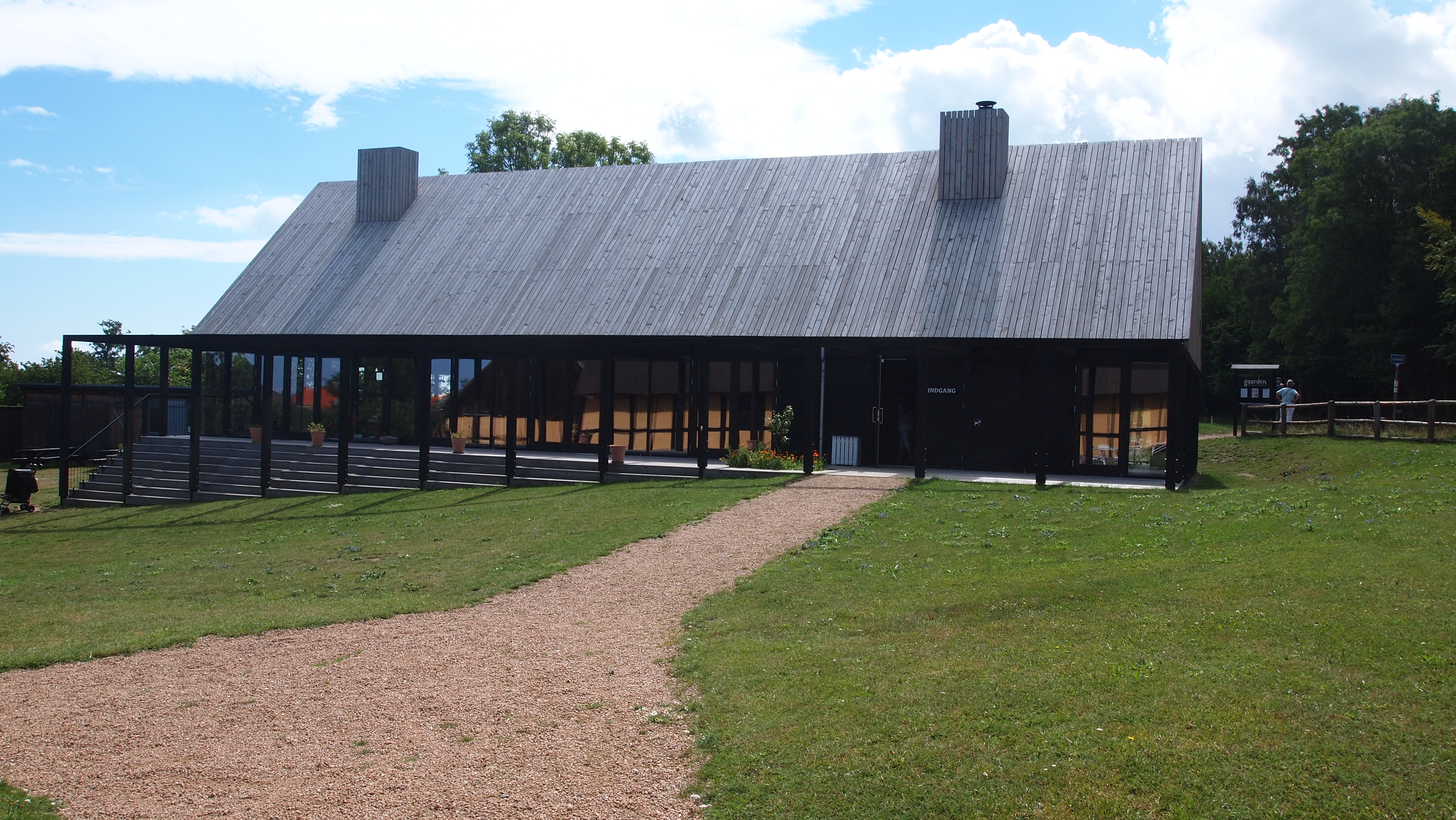 De nye madkulturhus det blev etableret i 2015.